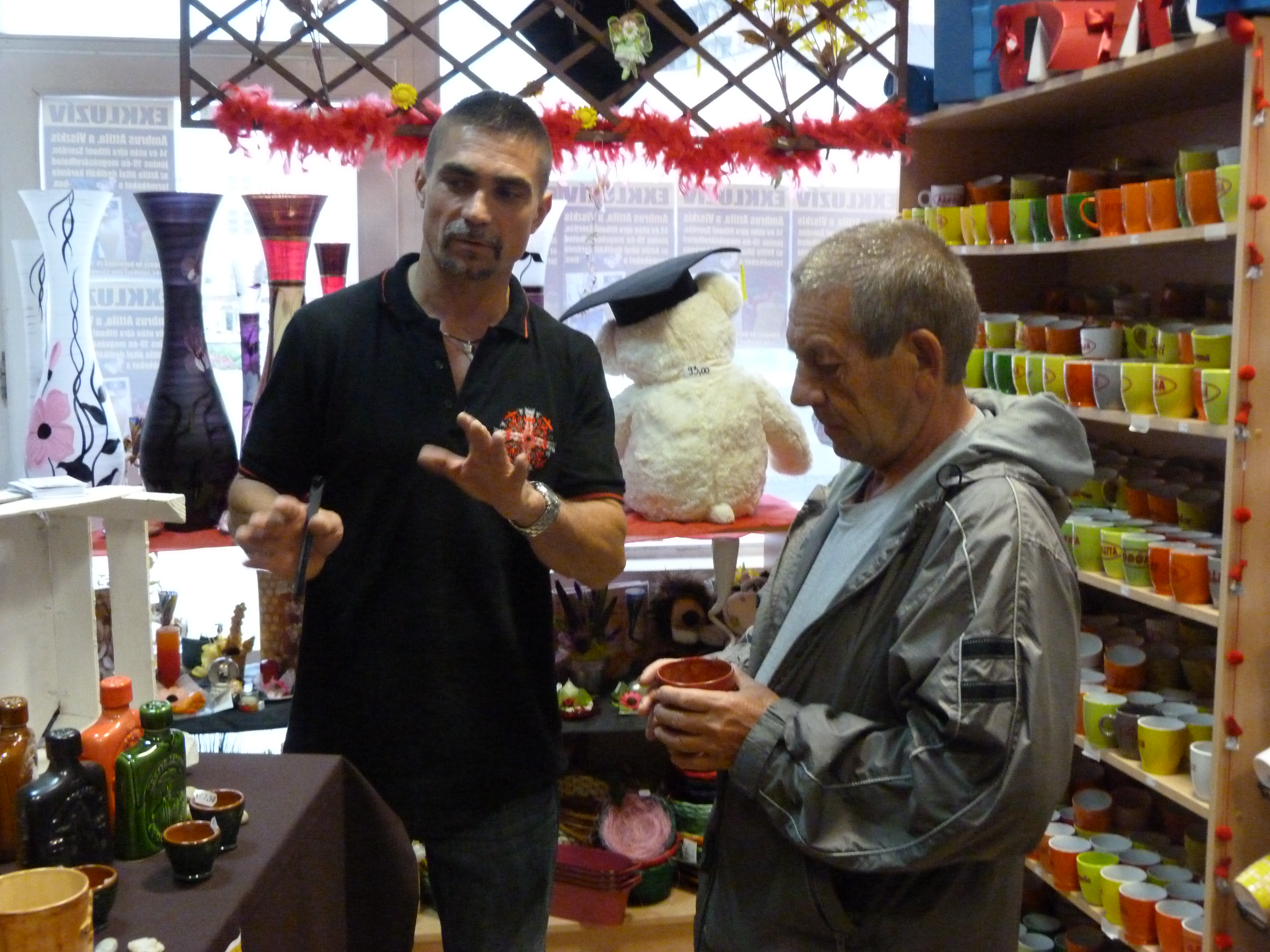 A felvétel 2013. Június 19 –én készült Csikszeredán, a Meglepi boltban. Ambrus Attila 14 év után hazatért Csikszeredába, szülővárosába. Források: Szökésben (hozzáférés 2013.07.02) P.Gál Judit - Ambrus Attila: Én a viszkis Julian Rubinstein: A viszkis rabló balladája ©© Derzsi Elekes Andor, Budapest, 2013, You are authorised to use this photo under Creative Commons – even for commercial, for profit purposes. The photo must be attributed to Derzsi Elekes Andor. All of the photos and vids in the Metapolisz DVD line are under Creative Commons and can be used even for commercial – for profit – purposes. Recommended Citation Derzsi Elekes Andor: Metapolisz DVD line Time: mashine time + 1 hour.